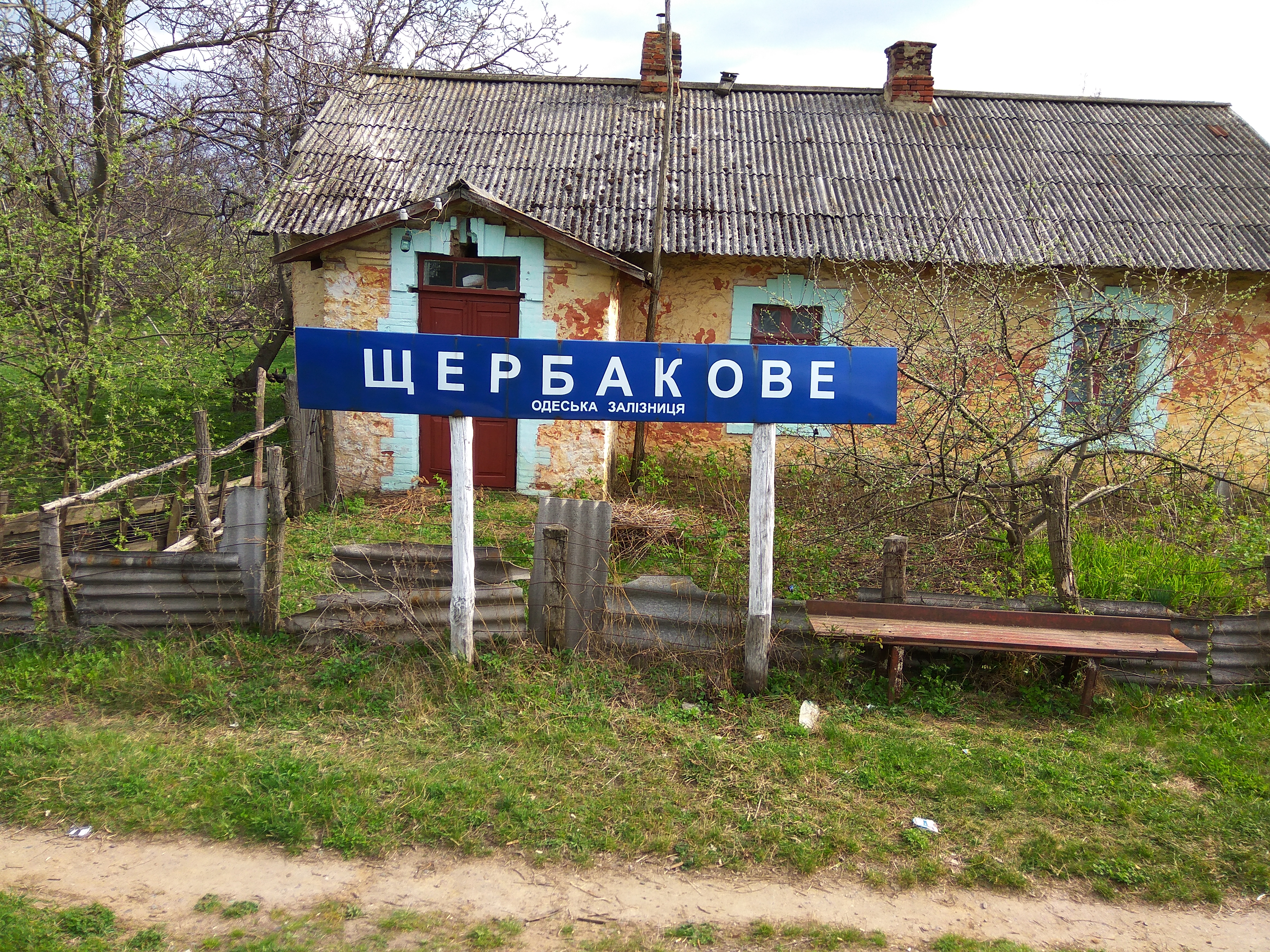 З.п. Щербакове